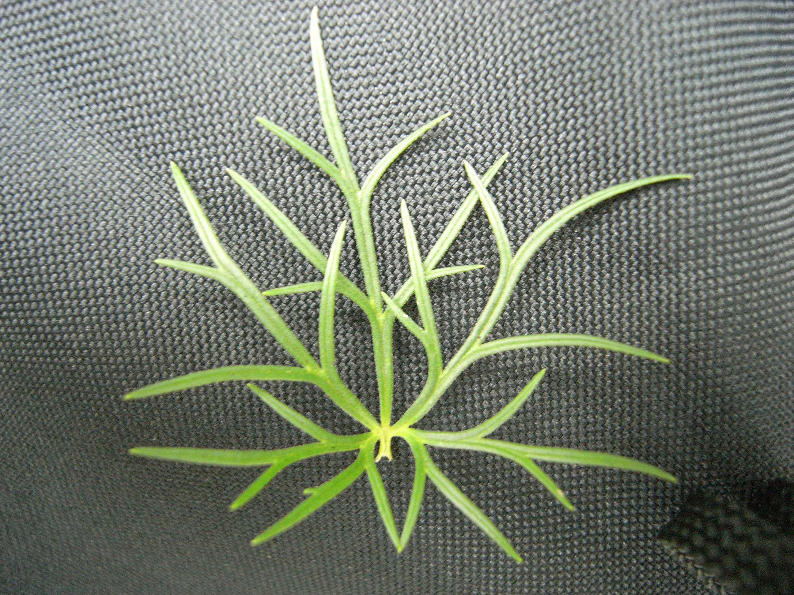 Aconitum anthora Blassgelber Eisenhut Blätter leaves